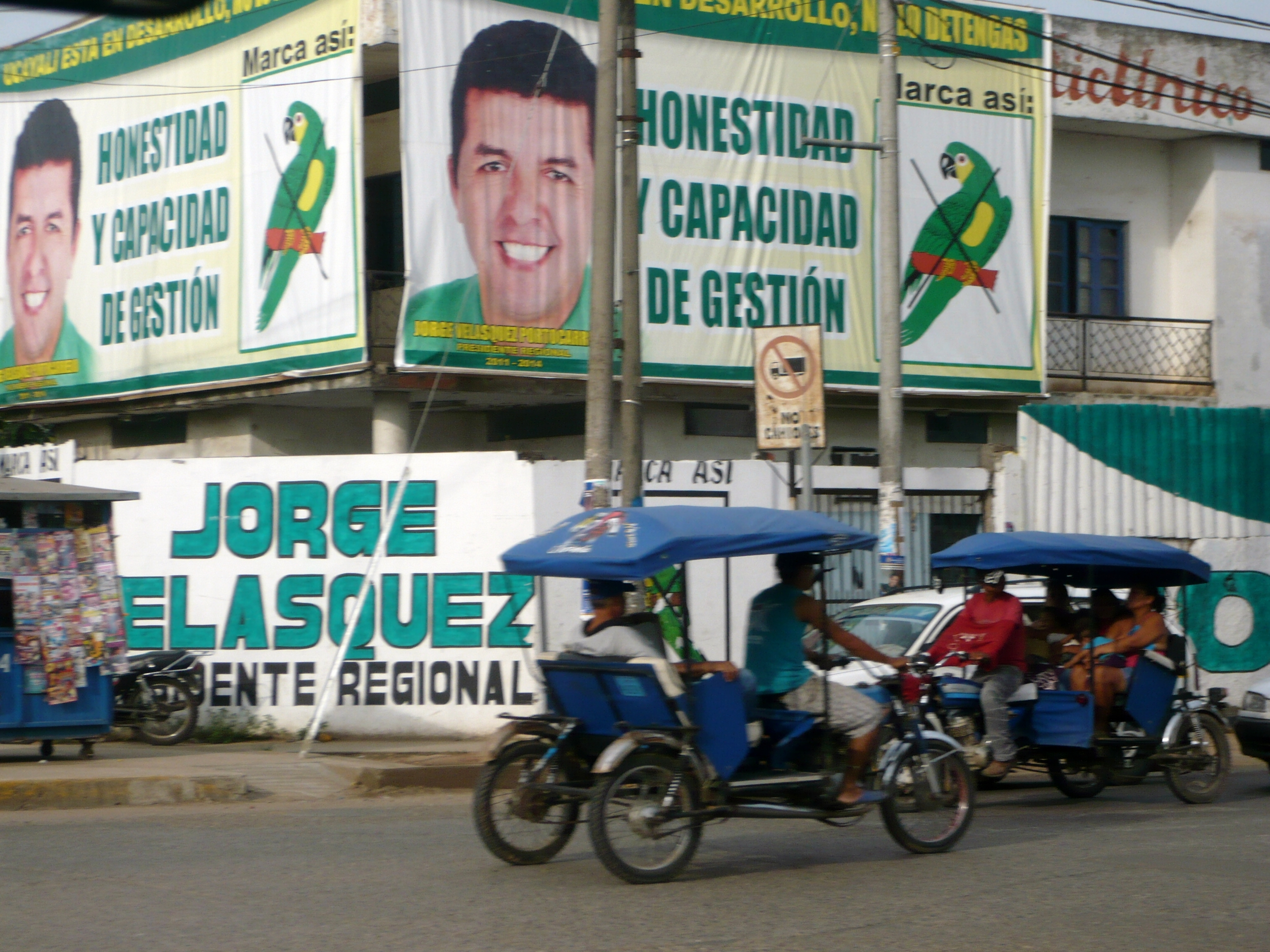 Anuncio de Jorge Velásquez Portocarrero figurado en un anuncio político para las elecciones de 2010.